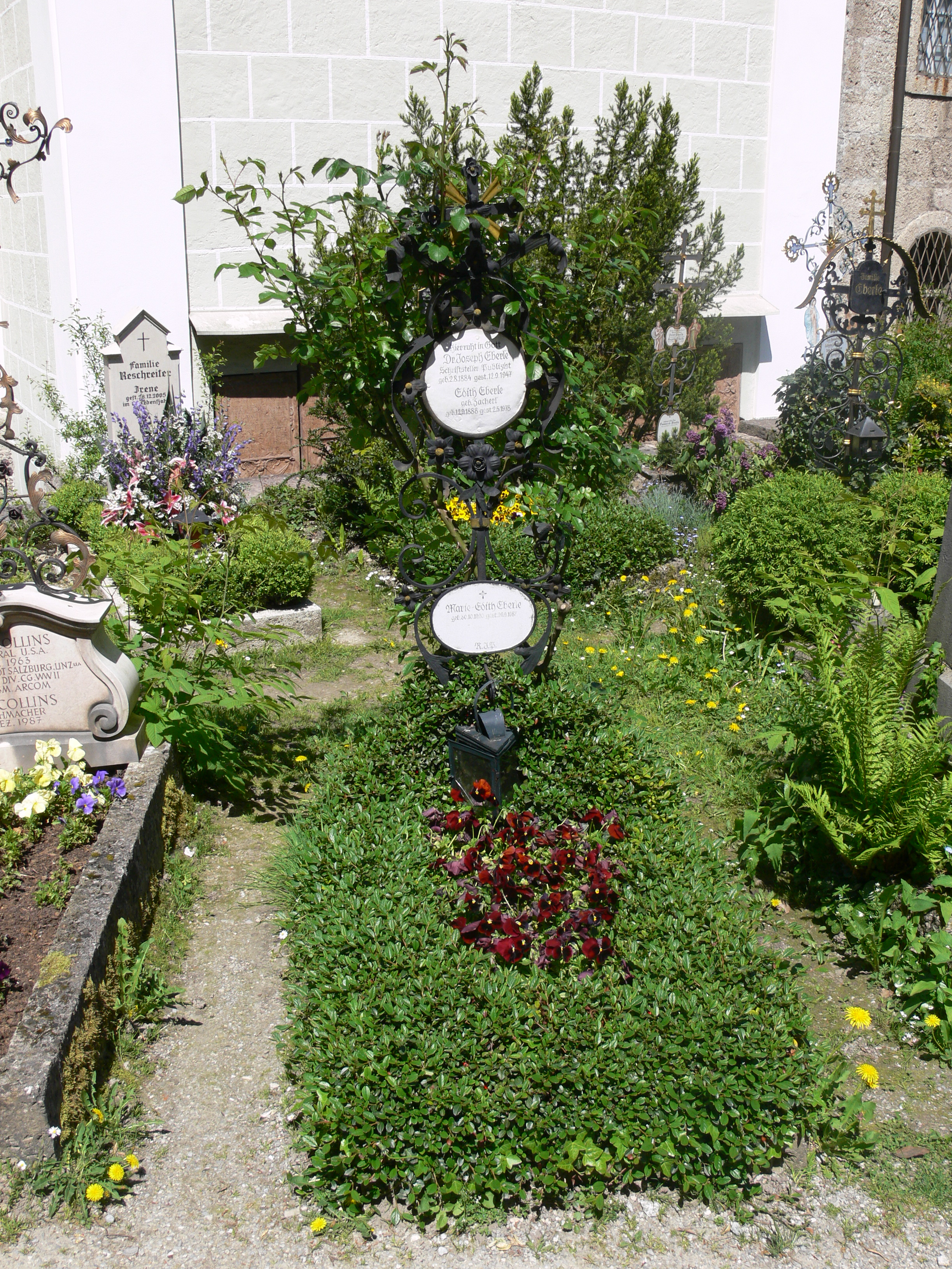 Petersfriedhof Salzburg Grabmal des Publizisten Joseph Eberle